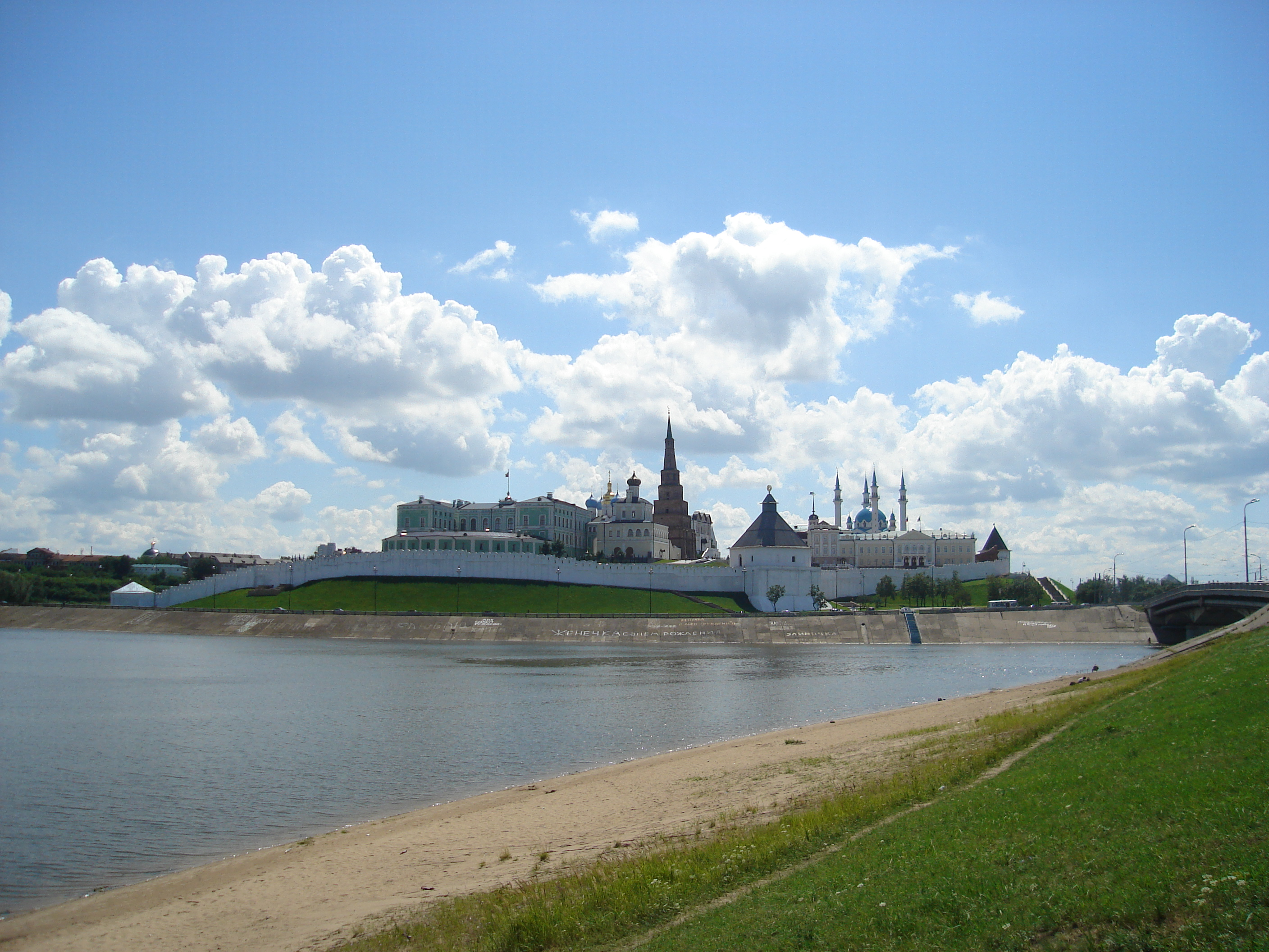 Söyembikä Tower